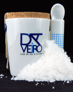 Flor de Sal D'Aveiro, Eco Sal, colhida unicamente de forma artesanal nas milenares salinas de Aveiro.